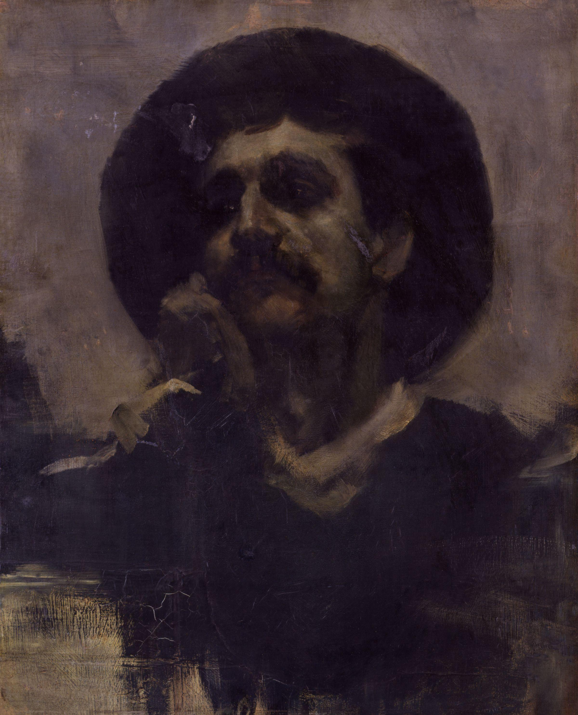 Self-portrait